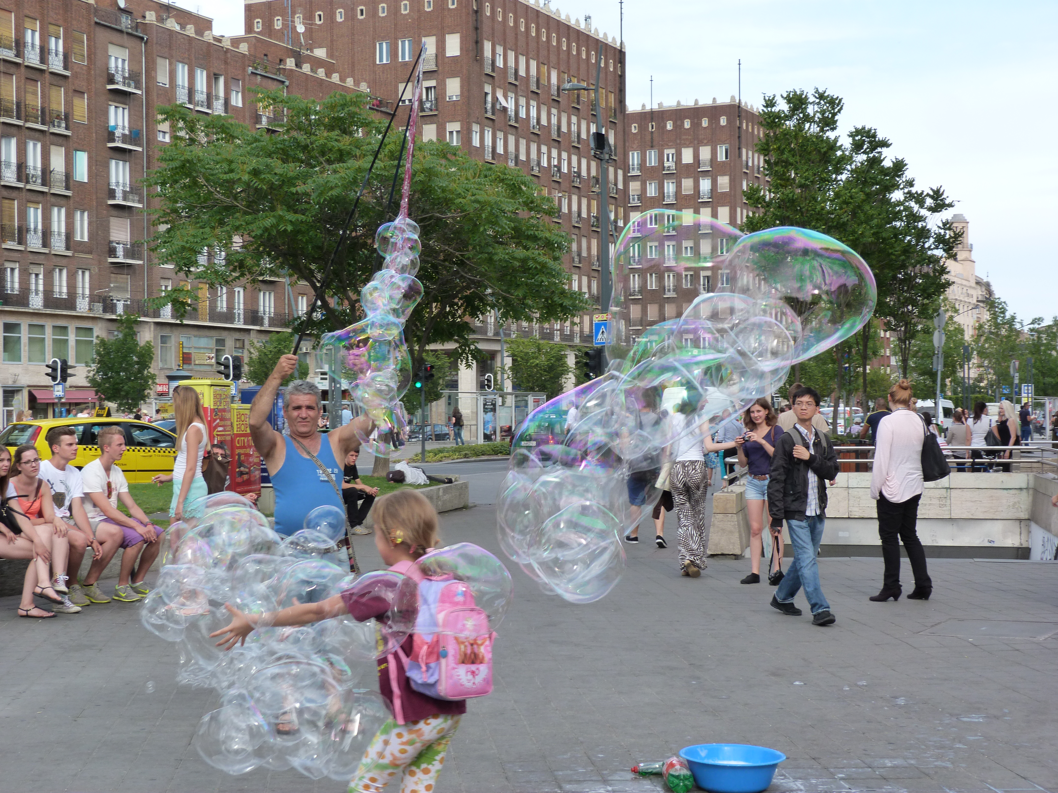 Károly krt. 17-19, Madách tér 7?, jobbra pedig a Károly krt. 13-15 épületei Budapesten. Deák tér felől nézve.